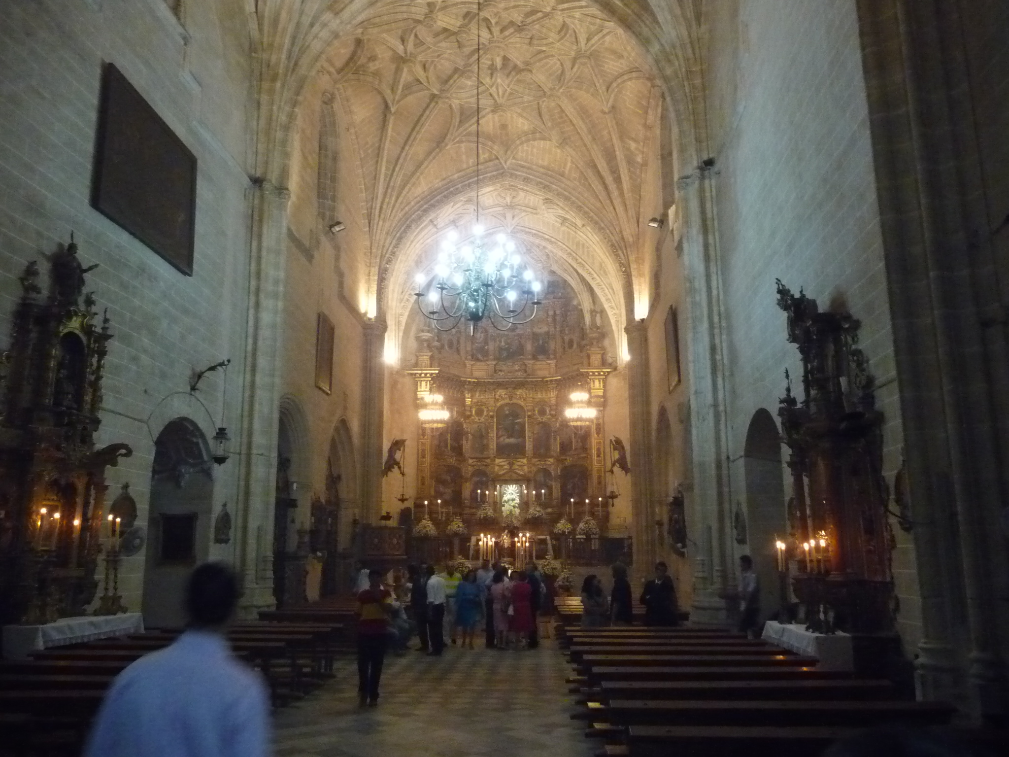 SanMarcos--Jerez-P1040563.JPG